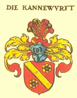 Wappen der Thüringischen, Sächsischen und Meißner Adelsfamilie Kannewurf